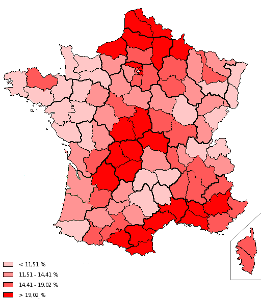 Résultat par département de la France métropolitaine du candidat Georges Marchais (PCF) au premier tour de l'élection présidentielle de 1981, le 26 avril (score total = 15,35 %). Source : La Documentation française.